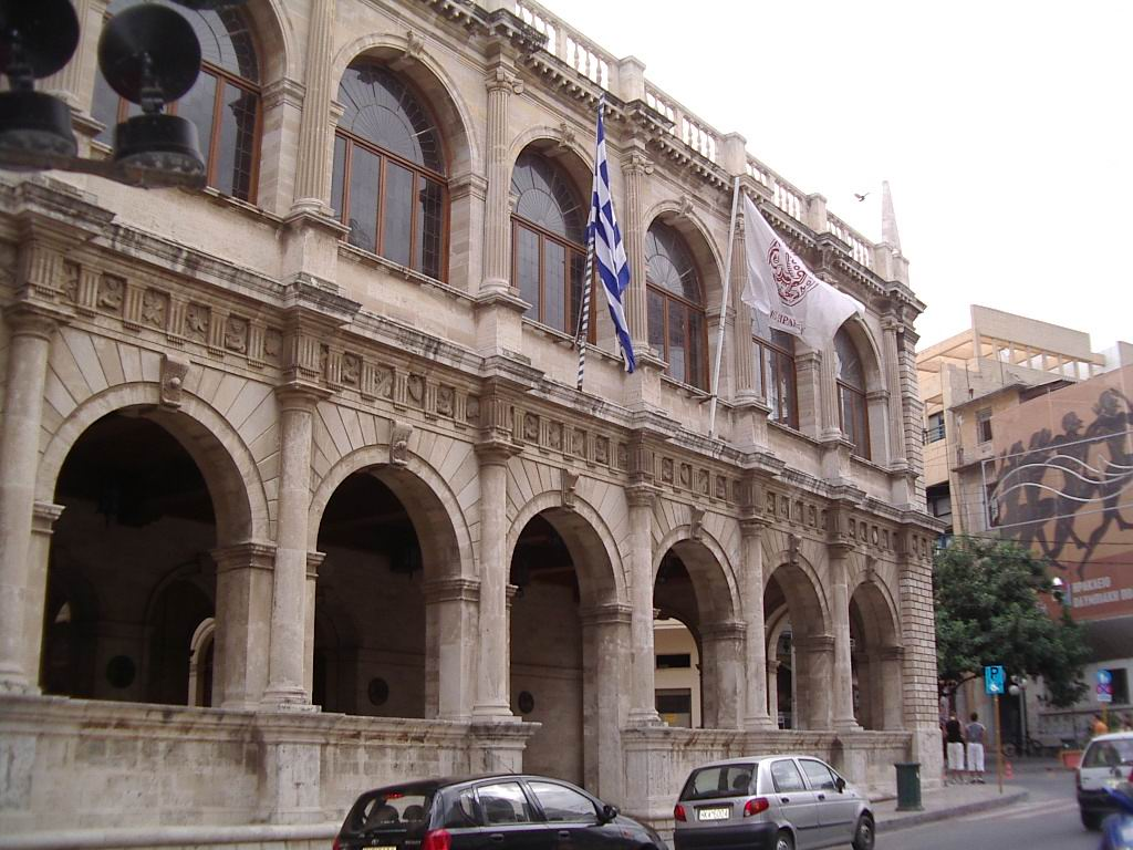 Edifici de la Maona d'Herakleion, foto feta per J. Ollé l'agost del 2005